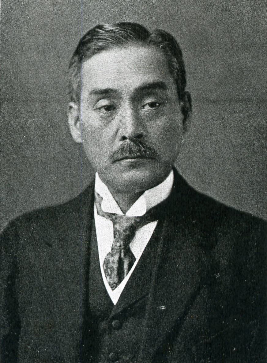 この写真は、第4代太田清蔵（1863-1946）の写真です。